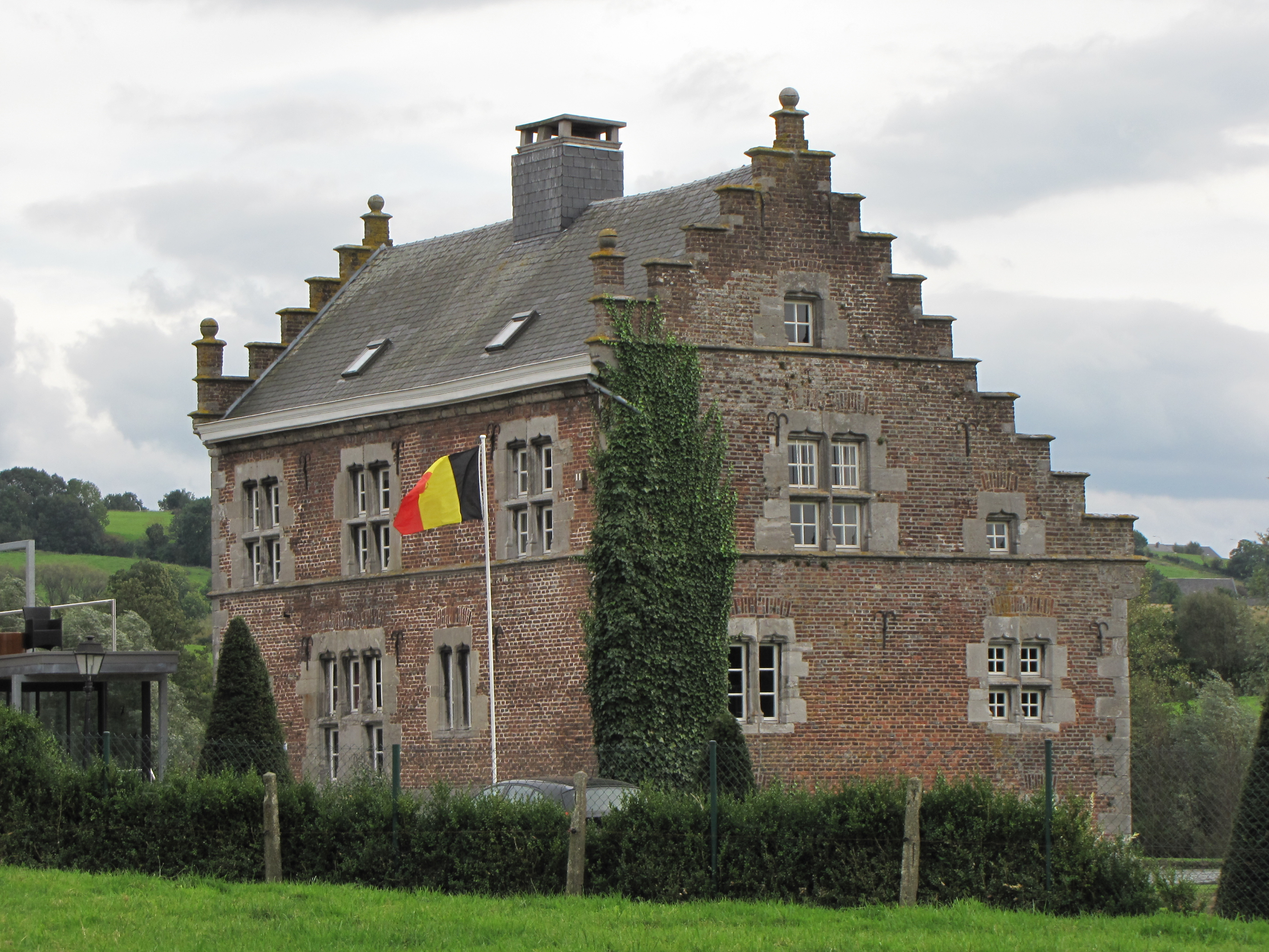 Construite en 1551, cette ferme château size dans le hameau de Crawhez fut transformée en restaurant en 2006.